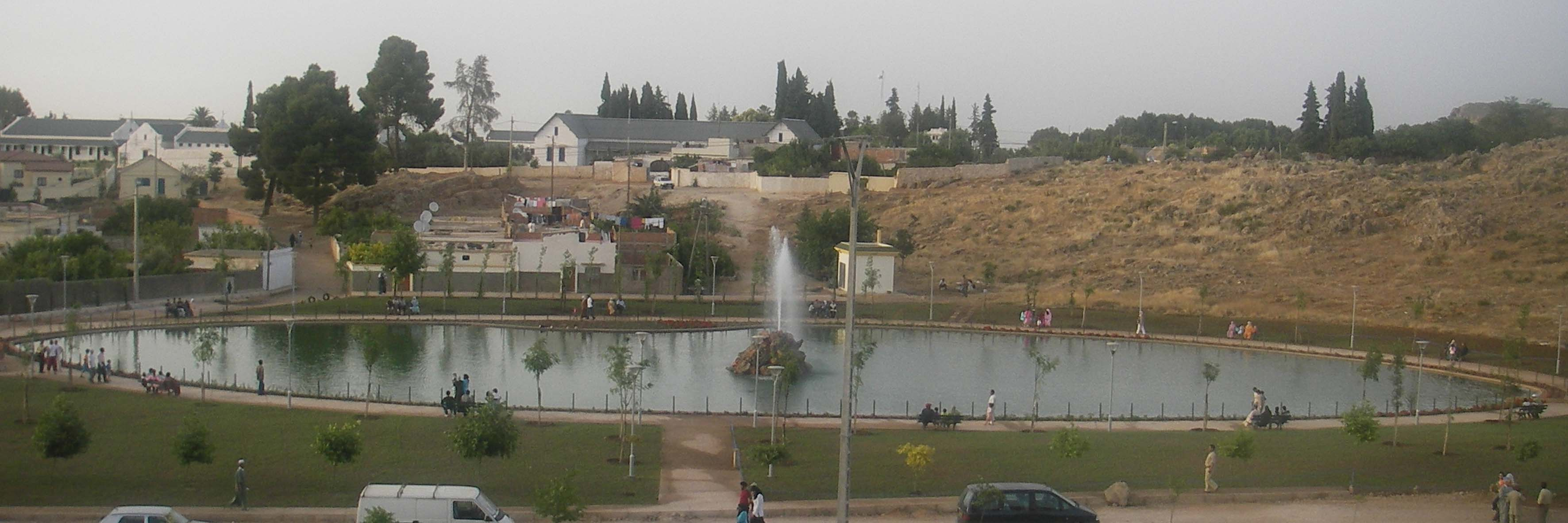 Lac artificiel d'El Hajeb (Maroc)